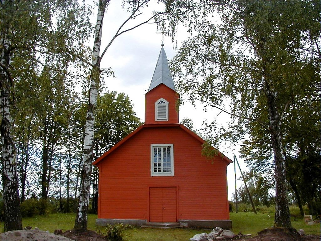 Augustovas sv. Elizabetes katoļu baznīca 2000-07-28